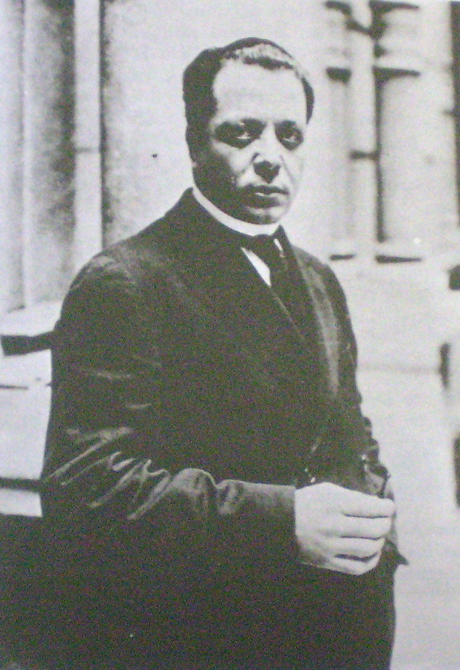 Salvador Debenedetti